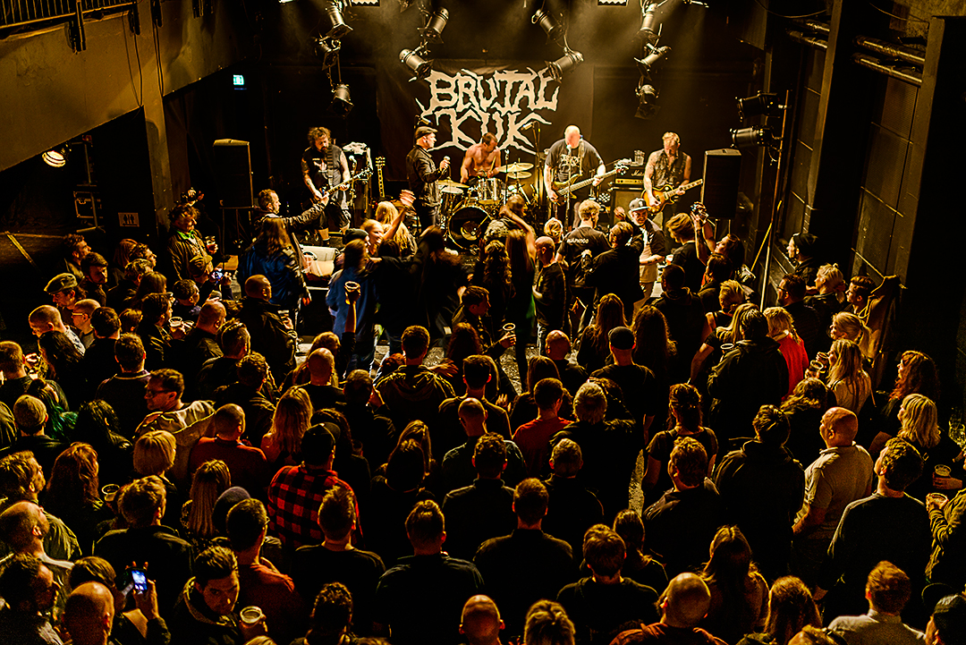 Brutal Kuk. Teaterhuset Avant Garden, Trondheim 18.03 2017.